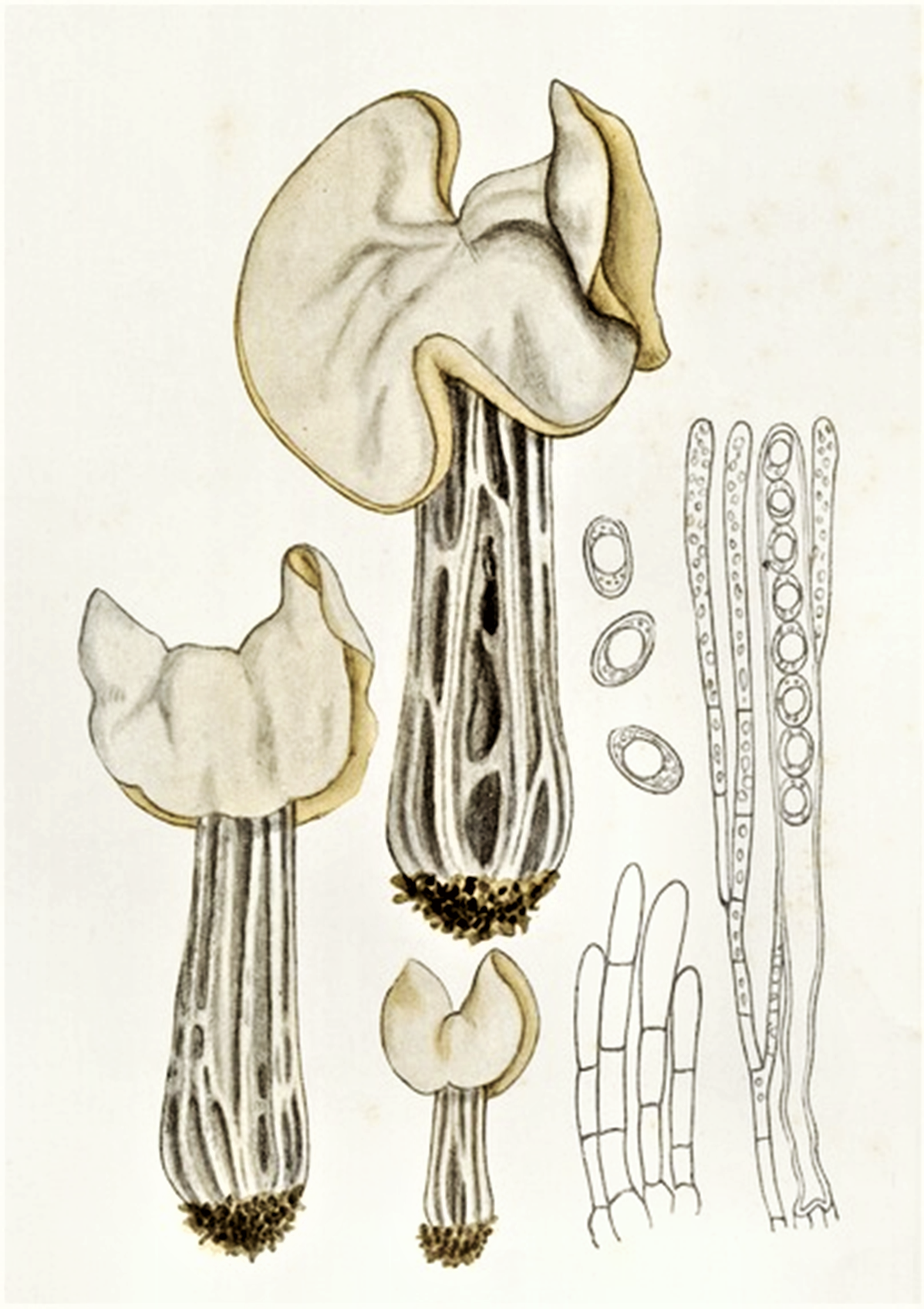 Giacomo Bresadola: Helvella crispa (Scop.) Fr. (1822)